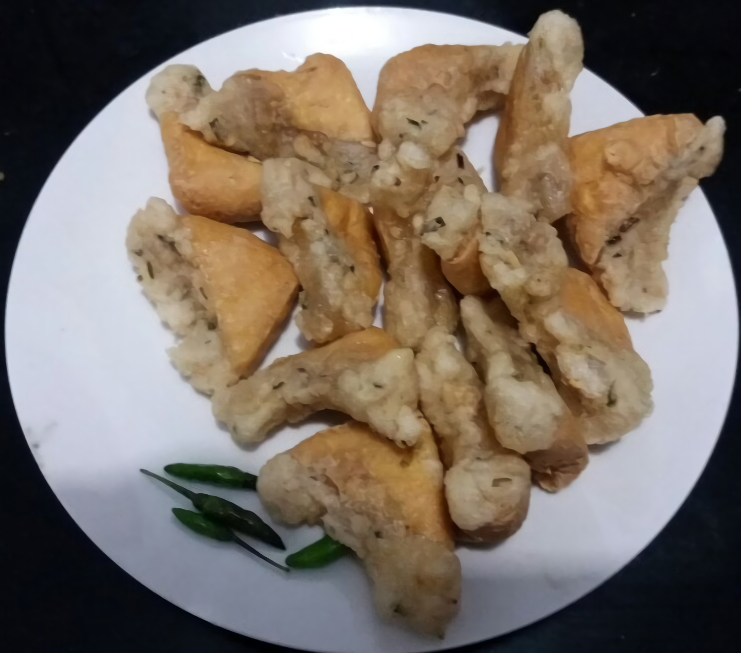 Gambar Tahu Aci